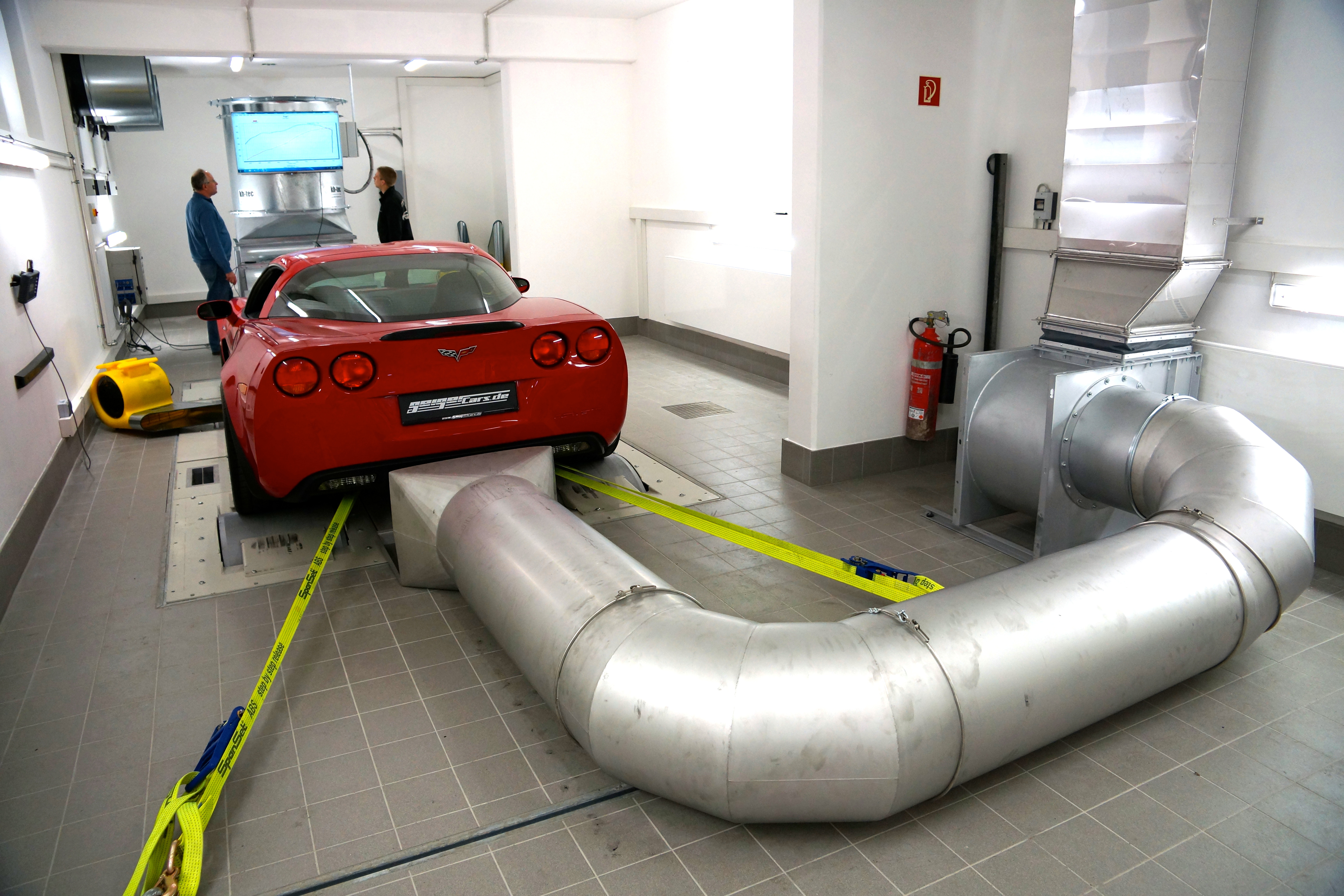 Geigercars Allrad-Rollenprüfstand zur Leistungsmessung bis 1.600 PS